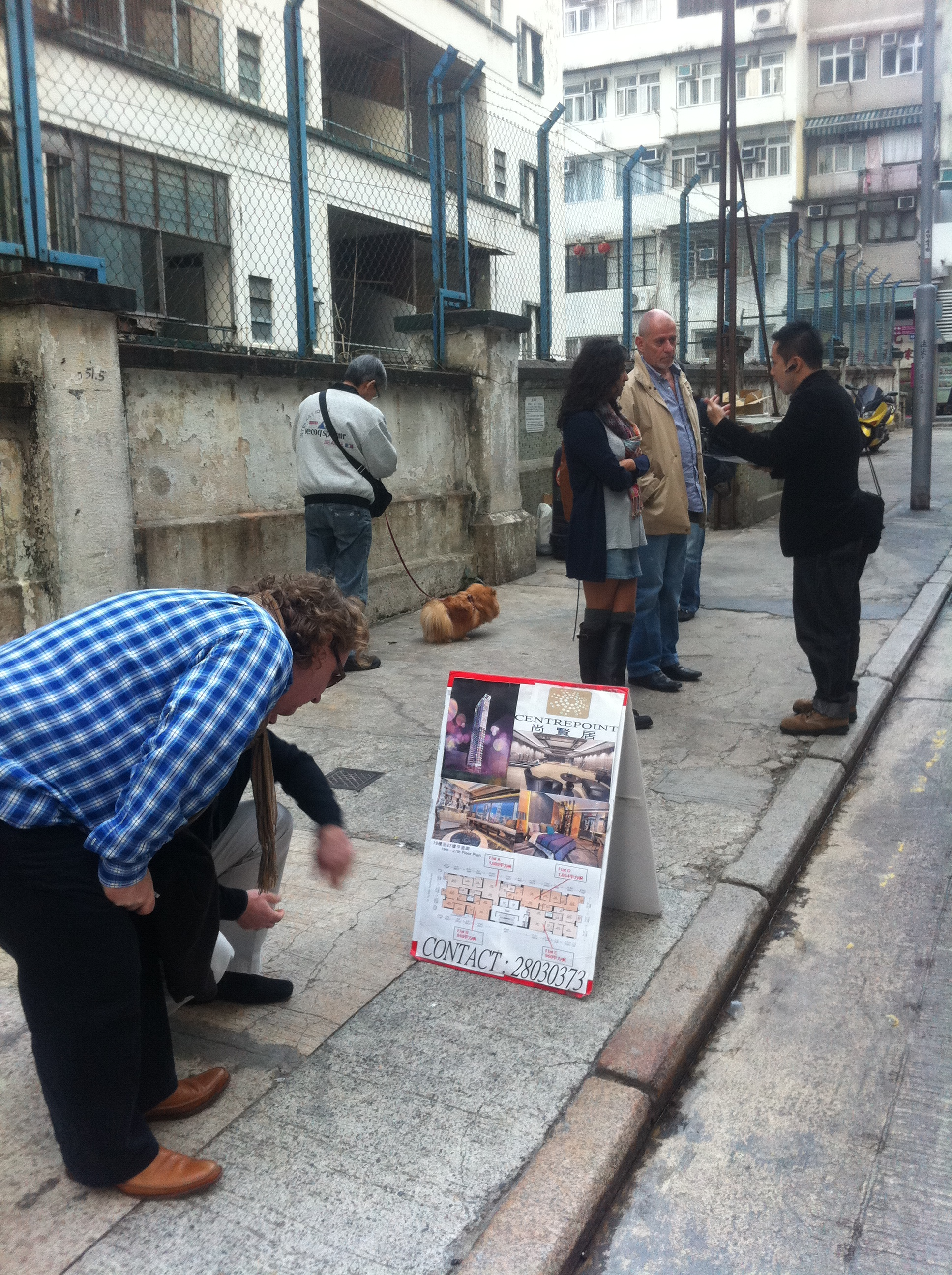 中文（香港）: 上環必列者士街 地產代理 A字牌